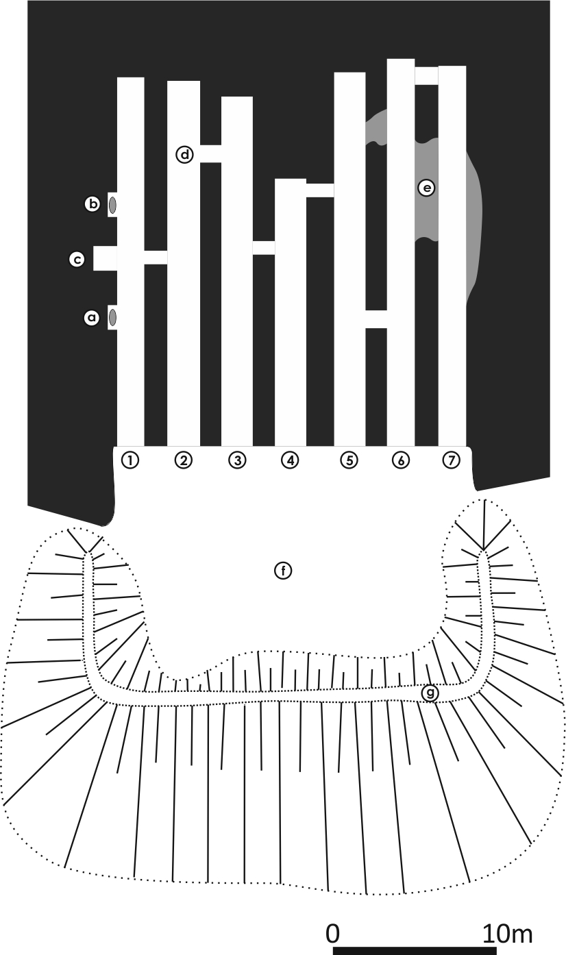 Розріз. Цифри у кулках: номери штолень. Букви у кулках: а) ближня камяна ванна b) центральна ніша c) дальня камяна ванна d) короткі штреки e) зруйнована частина штолень f) майданчик перед штольнями g) насипний вал